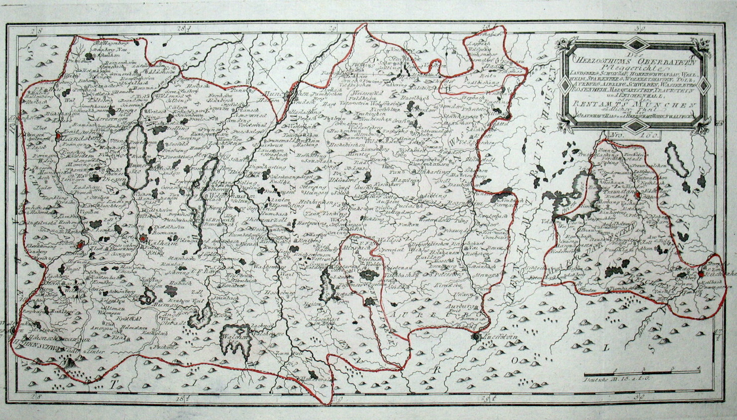 Des Herzogthums Oberbayern Pfleggerichte Landsberg, Schongau, Hohenschwangau, Weilheim, Starenberg, Wolfertshausen, Tölz, Aurburg, Aibling, Schwaben, Wasserburg, Rosenheim, Marquartstein, Traunstein und Reichenhall oder des Rentamts München südlicher Theil mit der Grafschaft Haag und Herrschaft Hohenwaldeck. Nro. 160. Kolorierter Kupferstich